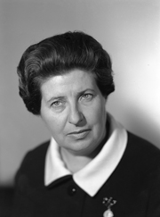 politica italiana